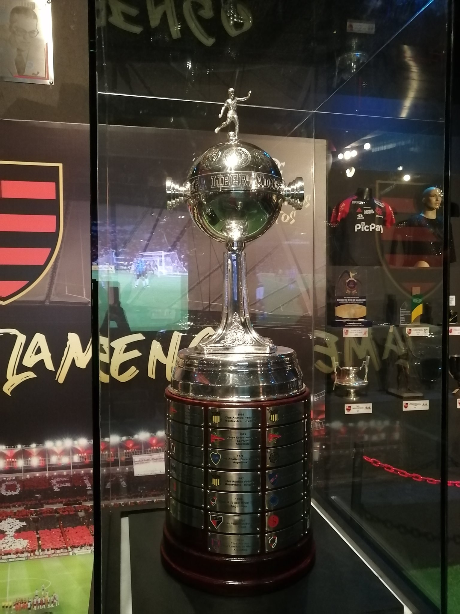 Troféu Copa Libertadores 2019 Conquistada pelo Flamengo